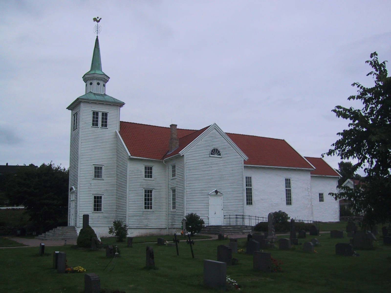 Spangereid kyrkje frå sør